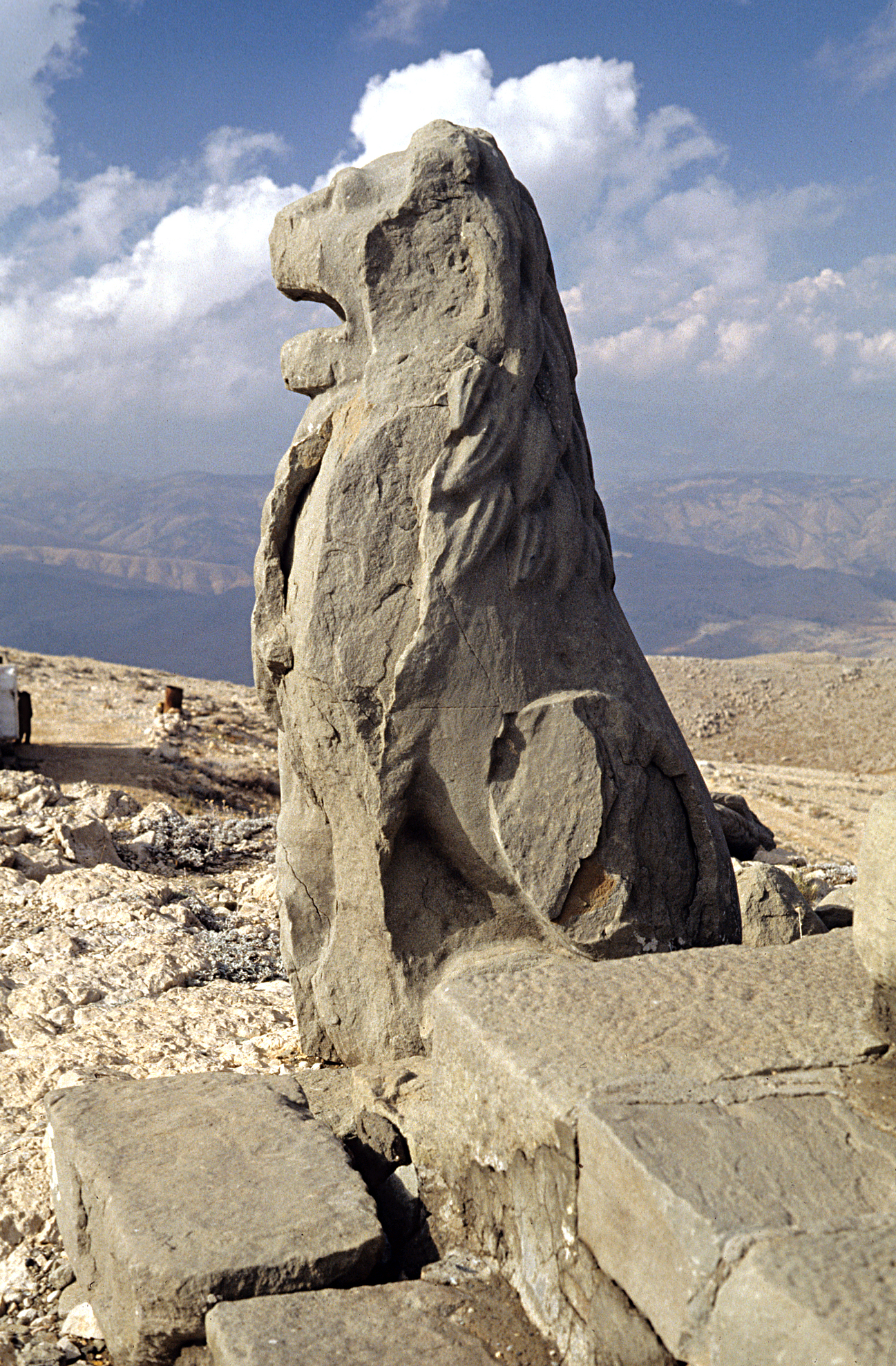 Wächterlöwe am Eingang des östlichen Prozessionsweges, Nemrut Dağı, Südosttürkei, Ostterrasse